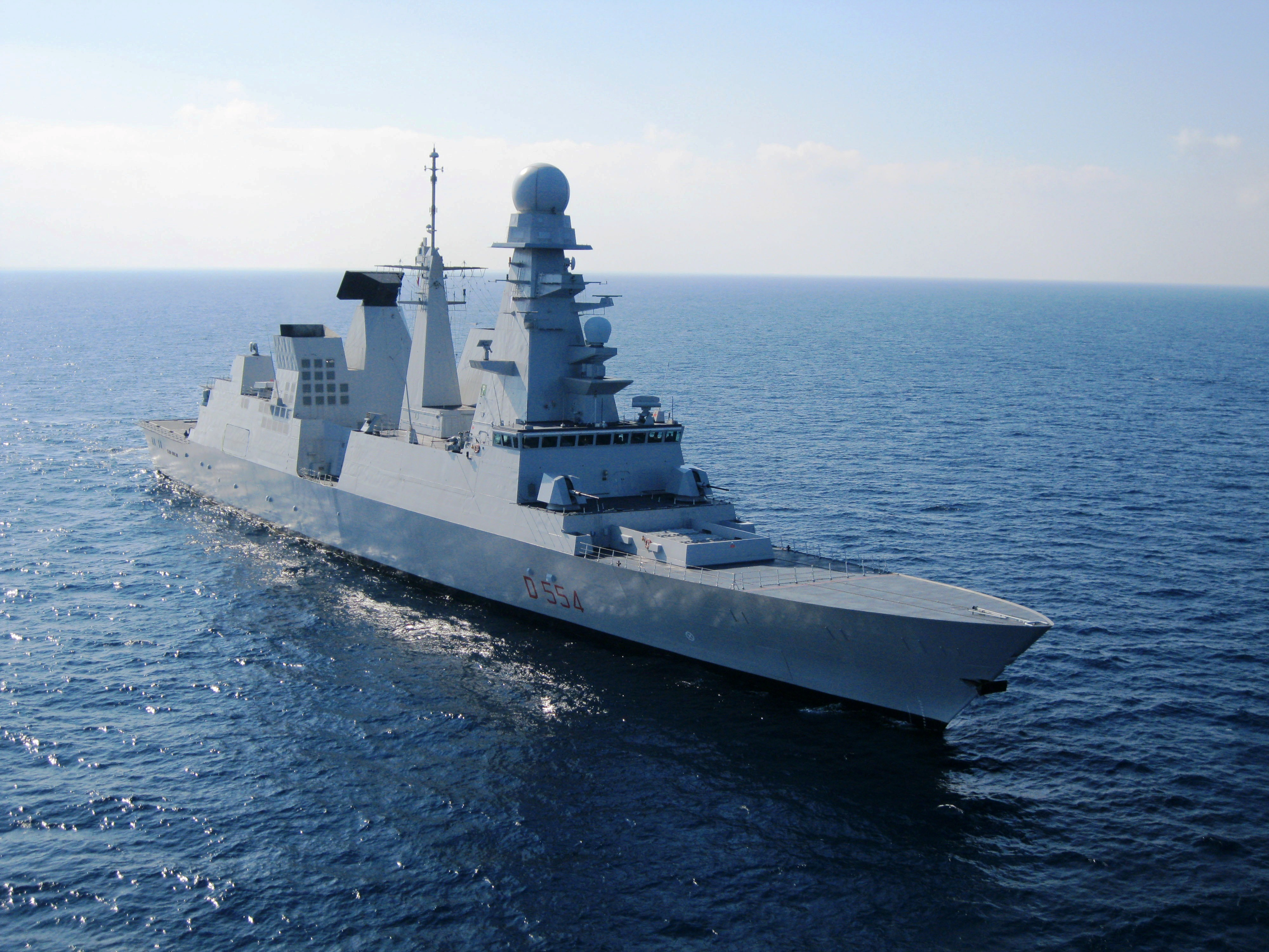 Nave Caio Duilio D554